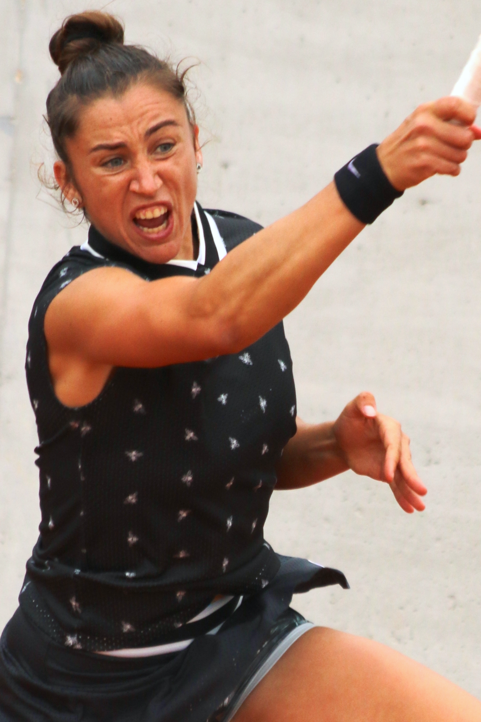 Sorribes Tormo RG19 (17)